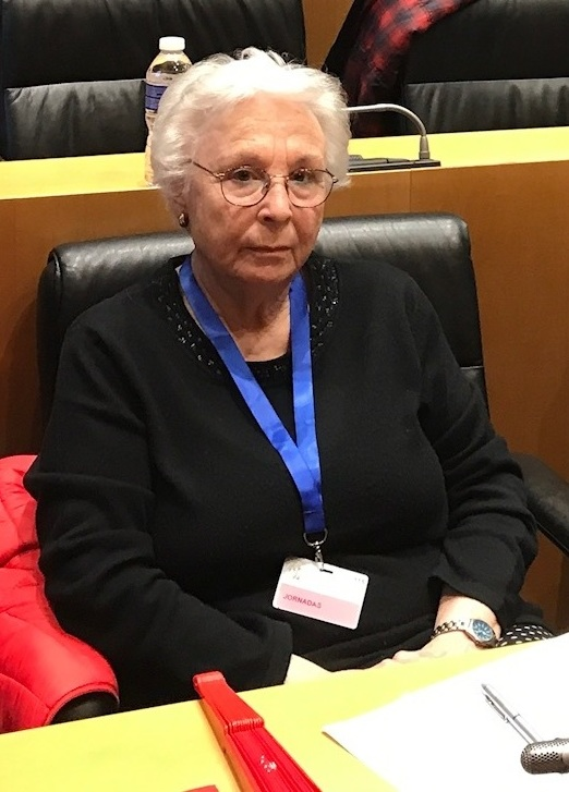 Jornada igualdad en las radiotelevisiones públicas. Congreso de Diptados. Jornadas organizadas por la Mesa de Igualdad del Congreso y UGT RTVE